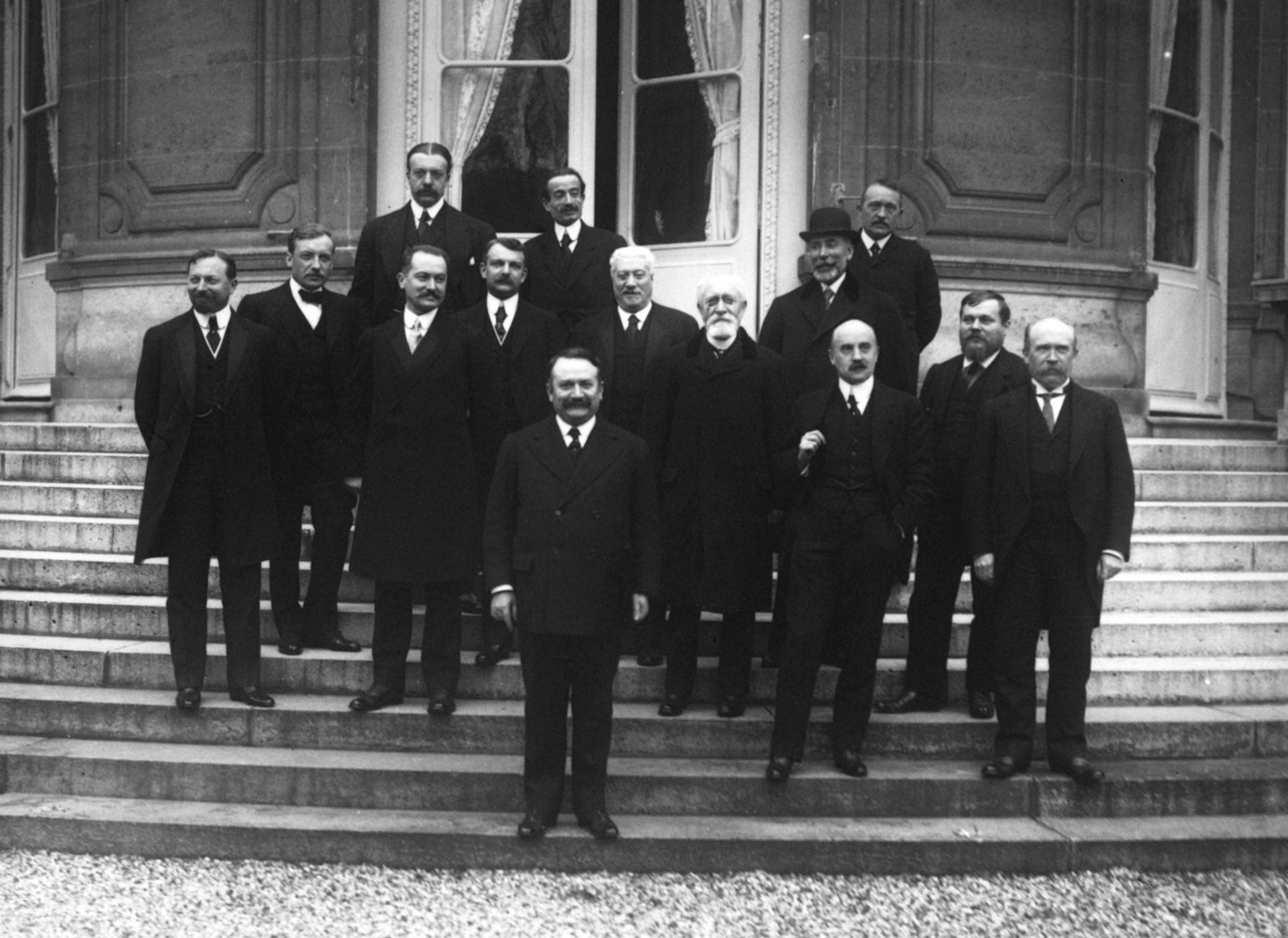 Les membres du gouverment Gaston Doumergue (1) posant sur le perron d'un ministère en 1913